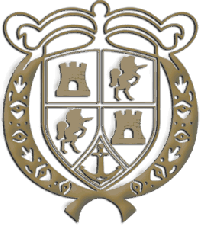 escudo del municipio de Girón, Santander